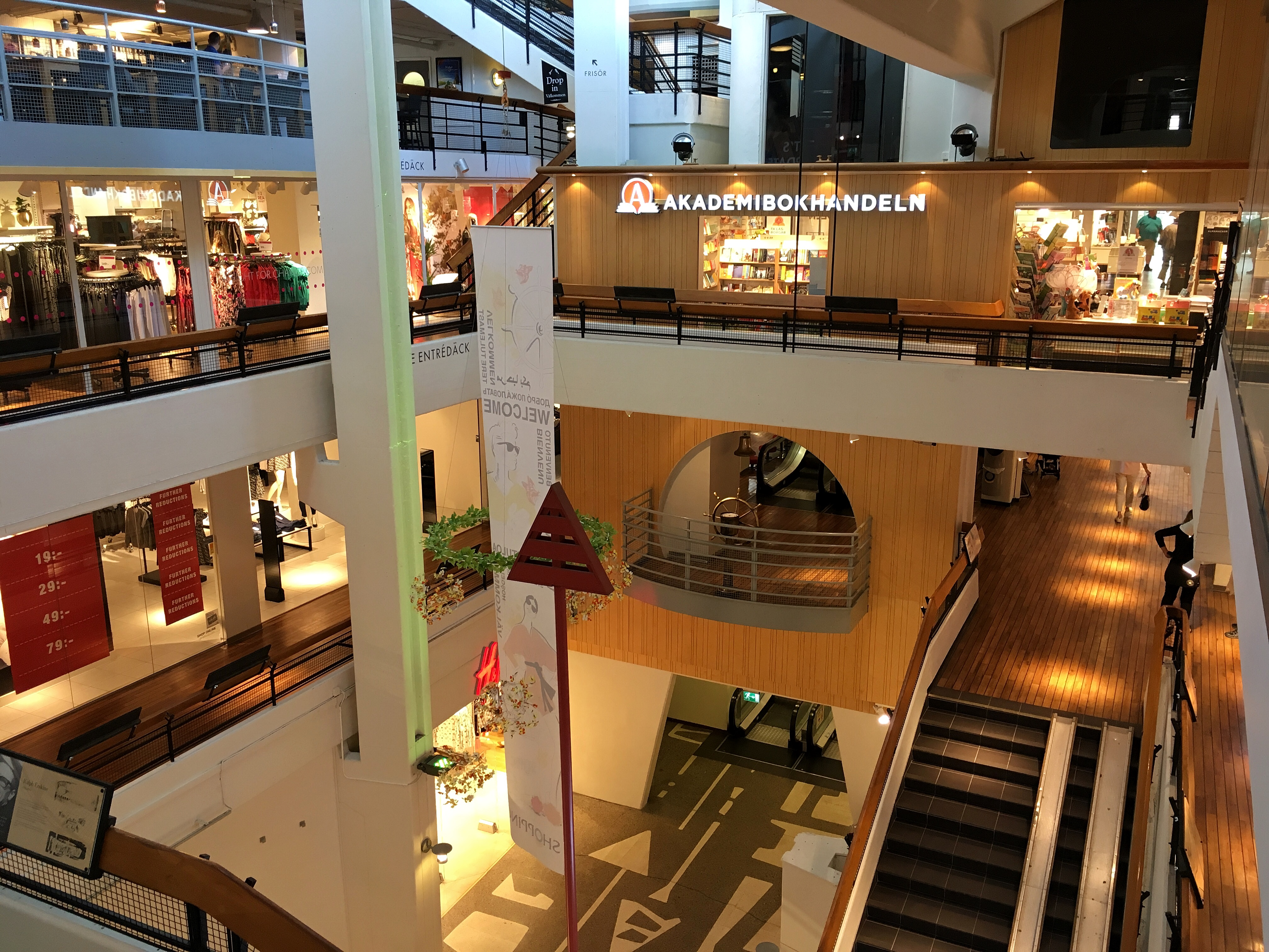 Shopping är en galleria i Luleå, invigd den 27 oktober 1955. Shopping blev därmed Sveriges och världens första köpcentrum inomhus. Bild från sommaren 2016.